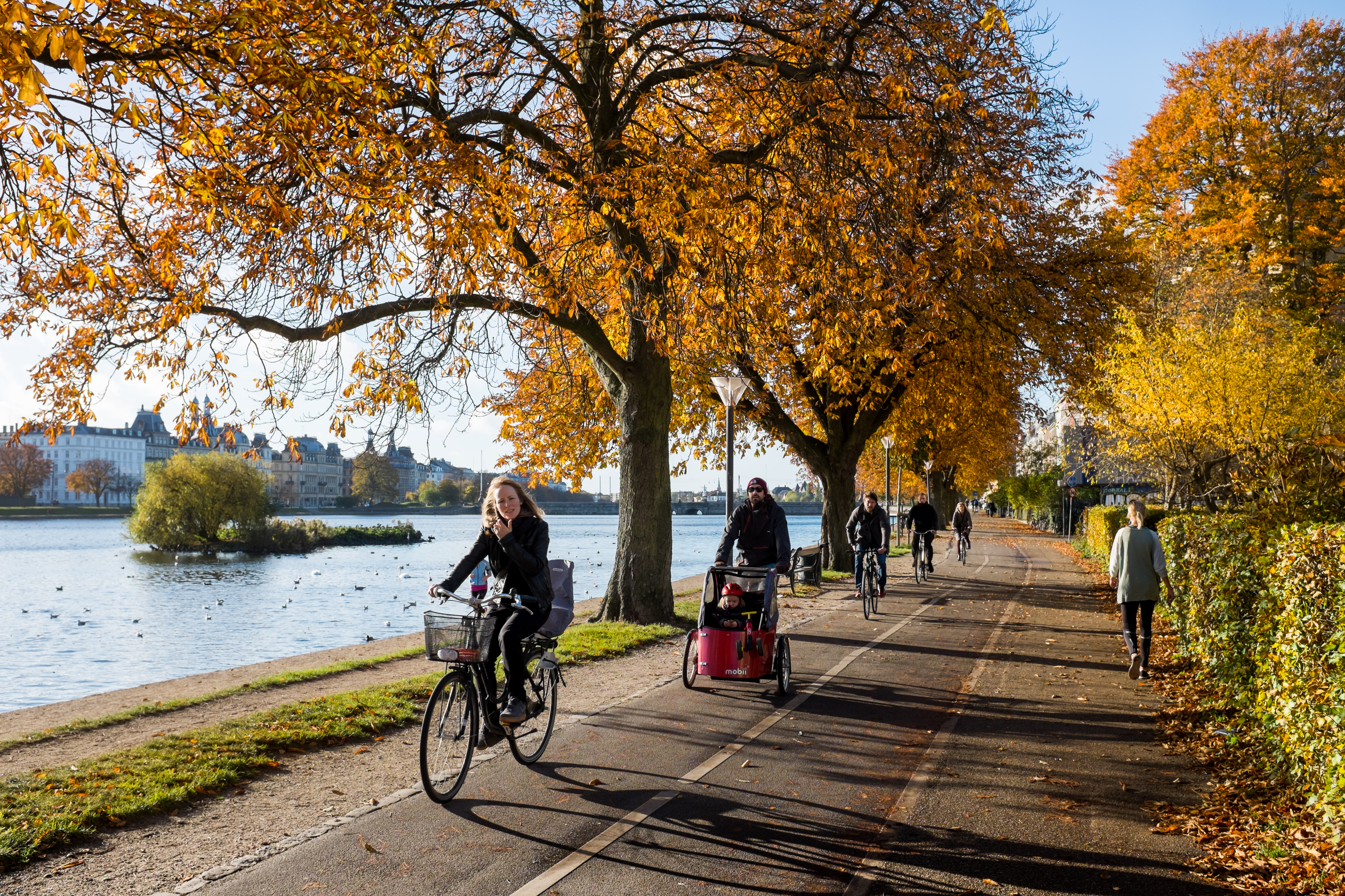 The bikeway Søruten along Sortedam Lake in Copenhagen, Denmark